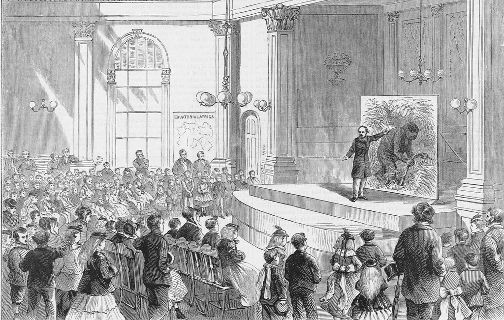 Engraving from Harper's Weekly